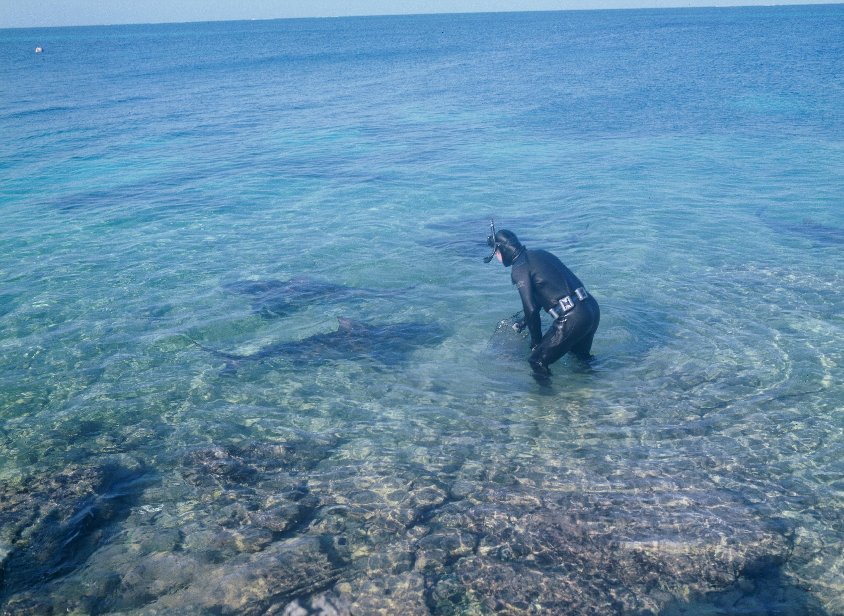 zelfgemaakt dooor A. Kok op Walkers Cay Bahama's